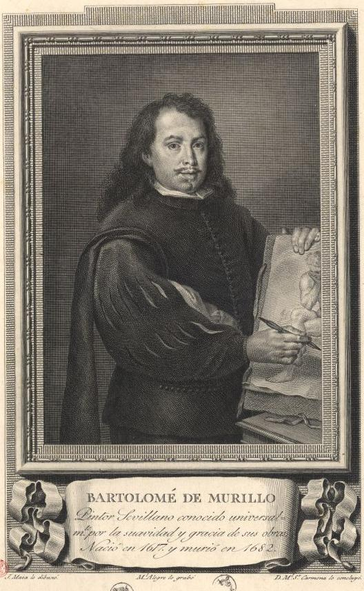 Retrato de Bartolomé de Murillo. Biblioteca Nacioal de Portugal.